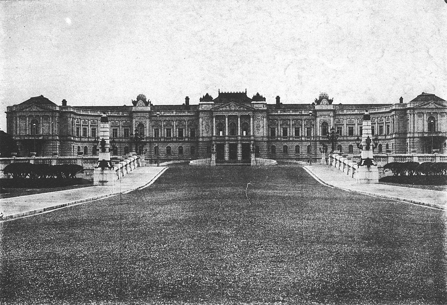 Togu-Gosho. Address (Meiji Era) Akasaka-ku, Motoakasaka-machi. Address (Present) Minato-ku, Motoakasaka. Late Edo Period Residence of Kishu (Tokugawa) Clan. Present (as of January, 2007) the Guest House in Akasaka.